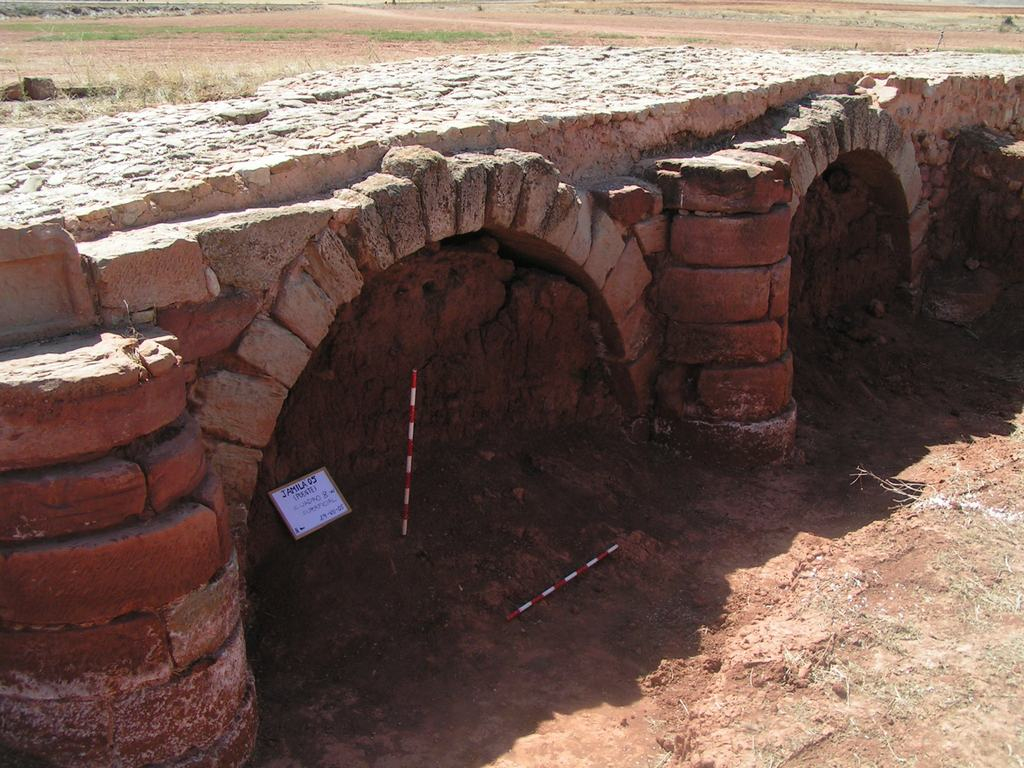 Arcada Norte del puente de Triviño, tras la última campaña arqueológica, año 2005.